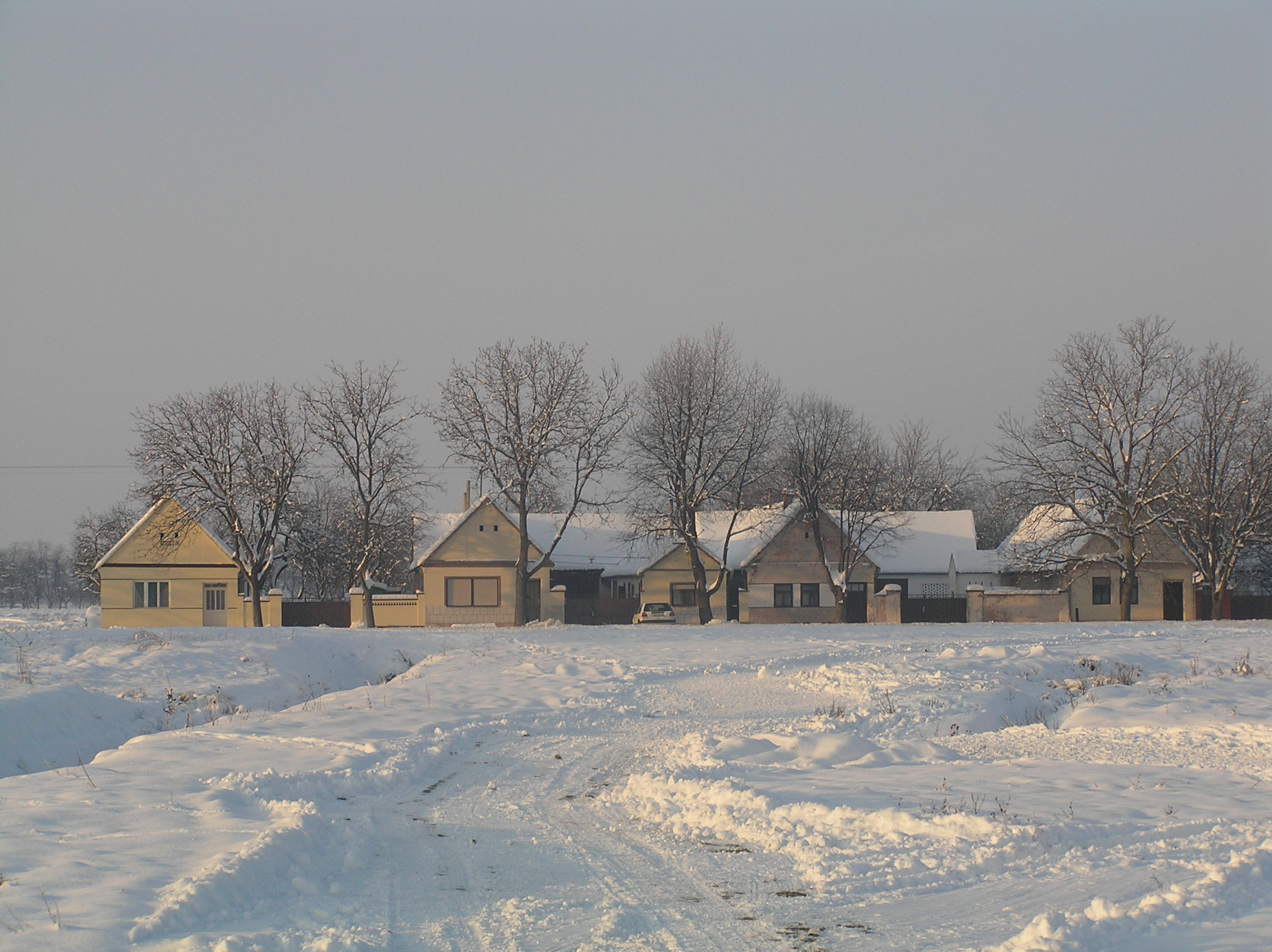 Berec"ak, dio sela Poganovaca